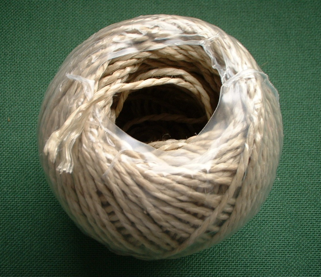 Bindfaden aus PP